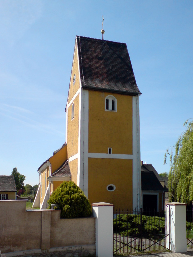 Die Dorfkirche des Leipziger Ortsteils Althen.